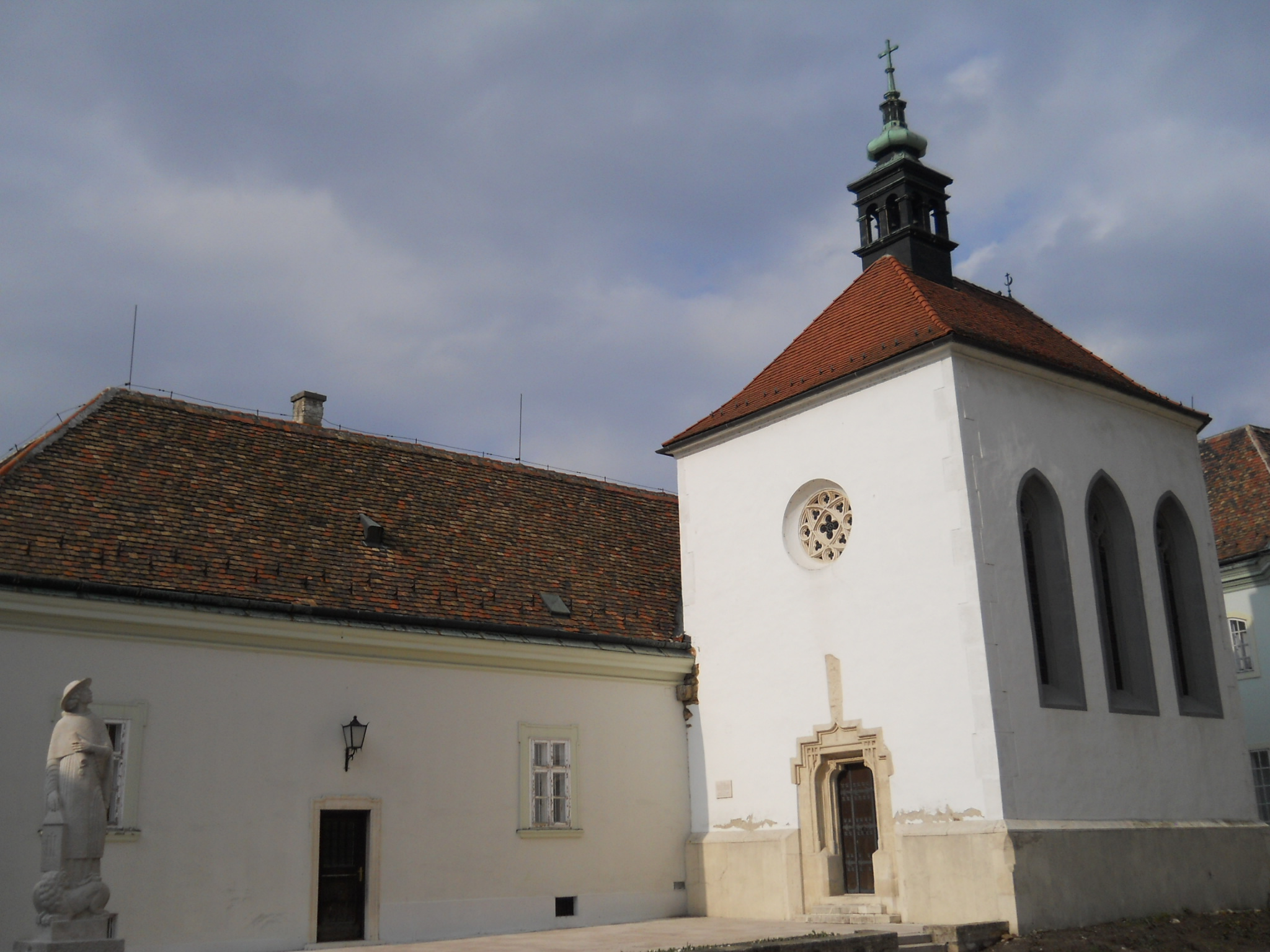 Székesfehérvár - Szent Anna-kápolna